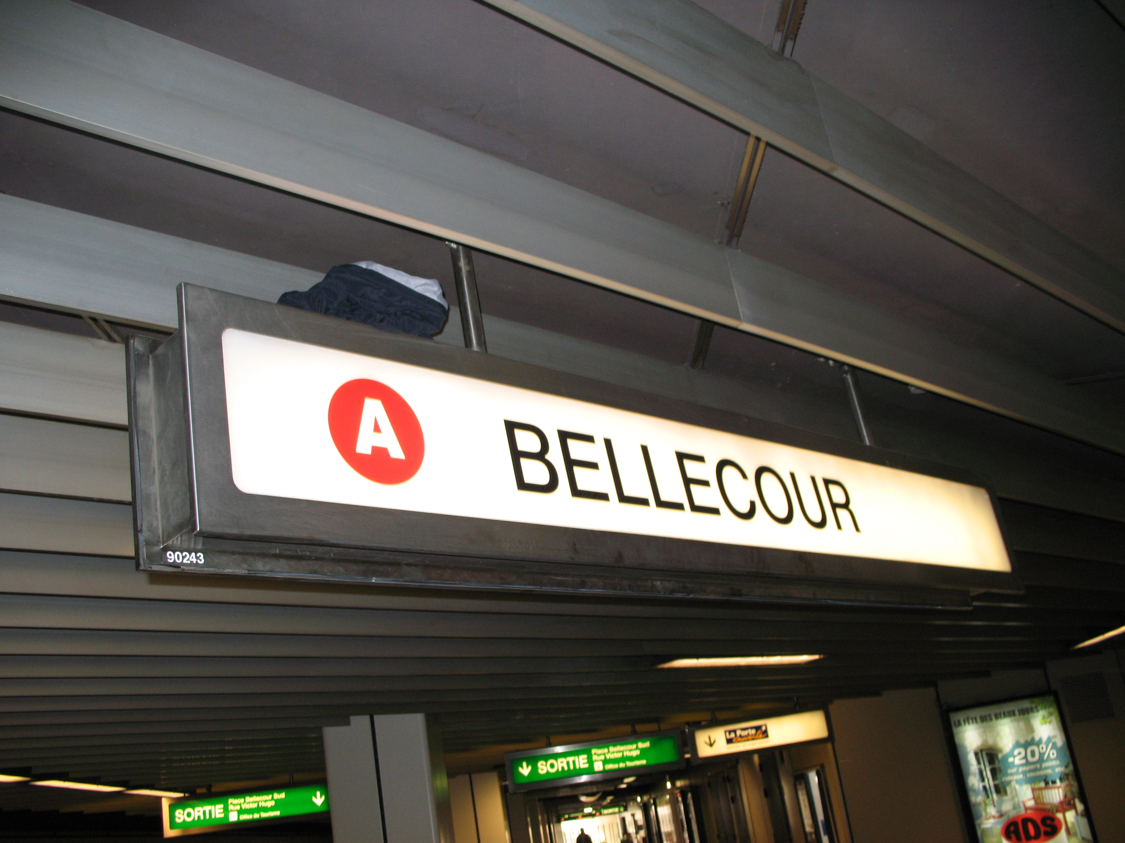 Enseigne du métro de Lyon TCL : station Bellecour sur la ligne A.